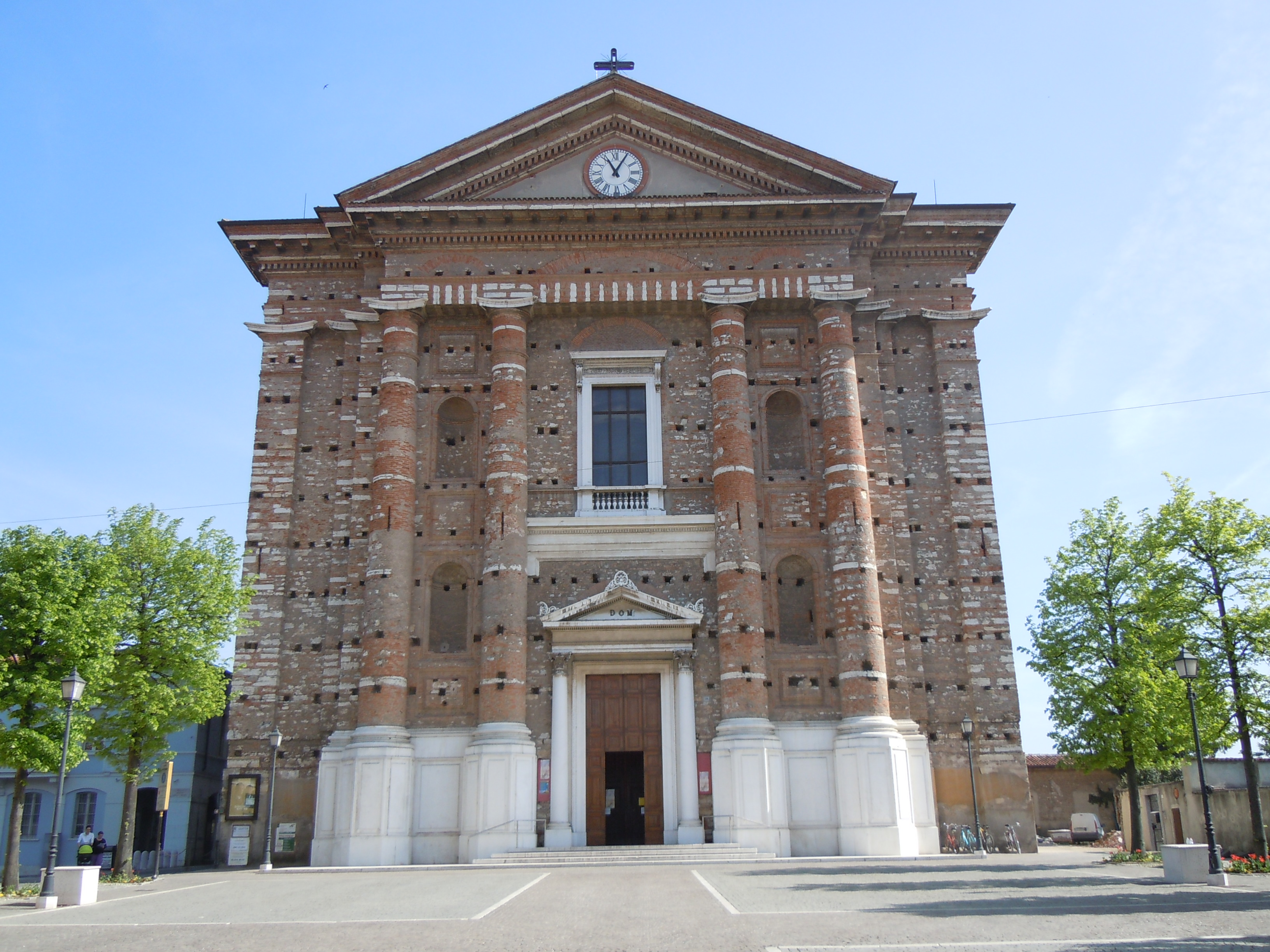 Castenedolo, chiesa parrocchiale di San Bartolomeo.